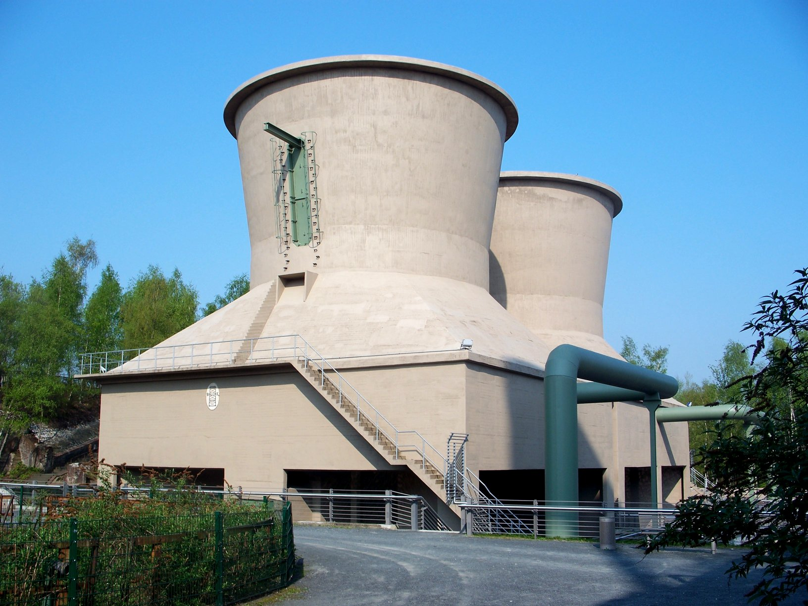 Typische Kühltürme von MAG Balcke (wegen der Form auch "Kaffeemühlen" genannt) an der Jahrhunderthalle in Bochum